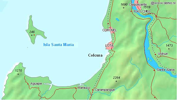 Colcura, Lota Province, Chile